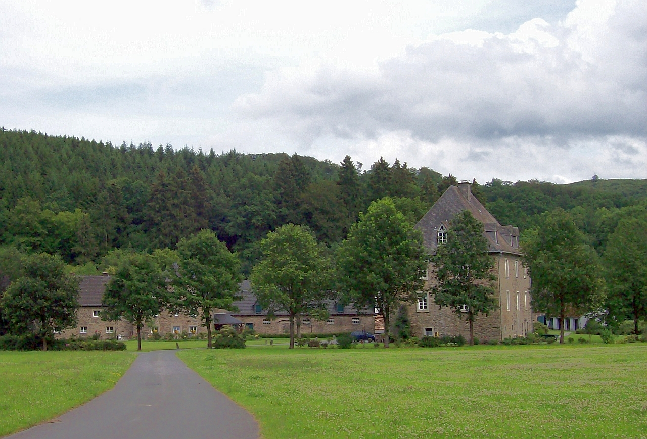 Haus Wenne in Eslohe (Germany)